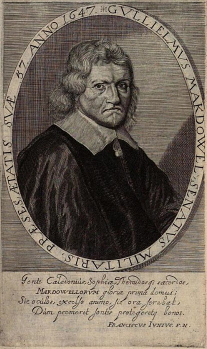 Portret van William Makdowell (1590-1667), hoogleraar te Groningen